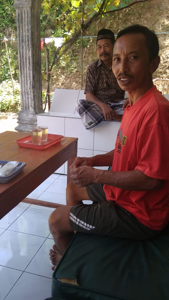 Sebagai tradisi biasa dalam kehidupan sehari-hari, sonjo bisa dilakukan oleh siapapun dan tidak perlu acara besar. Dalam foro ini misalkan, dua orang warga di Desa Pakel, Kabupaten Trenggalek, Jawa Timur, sedang sonjo dengan minum teh bersama.